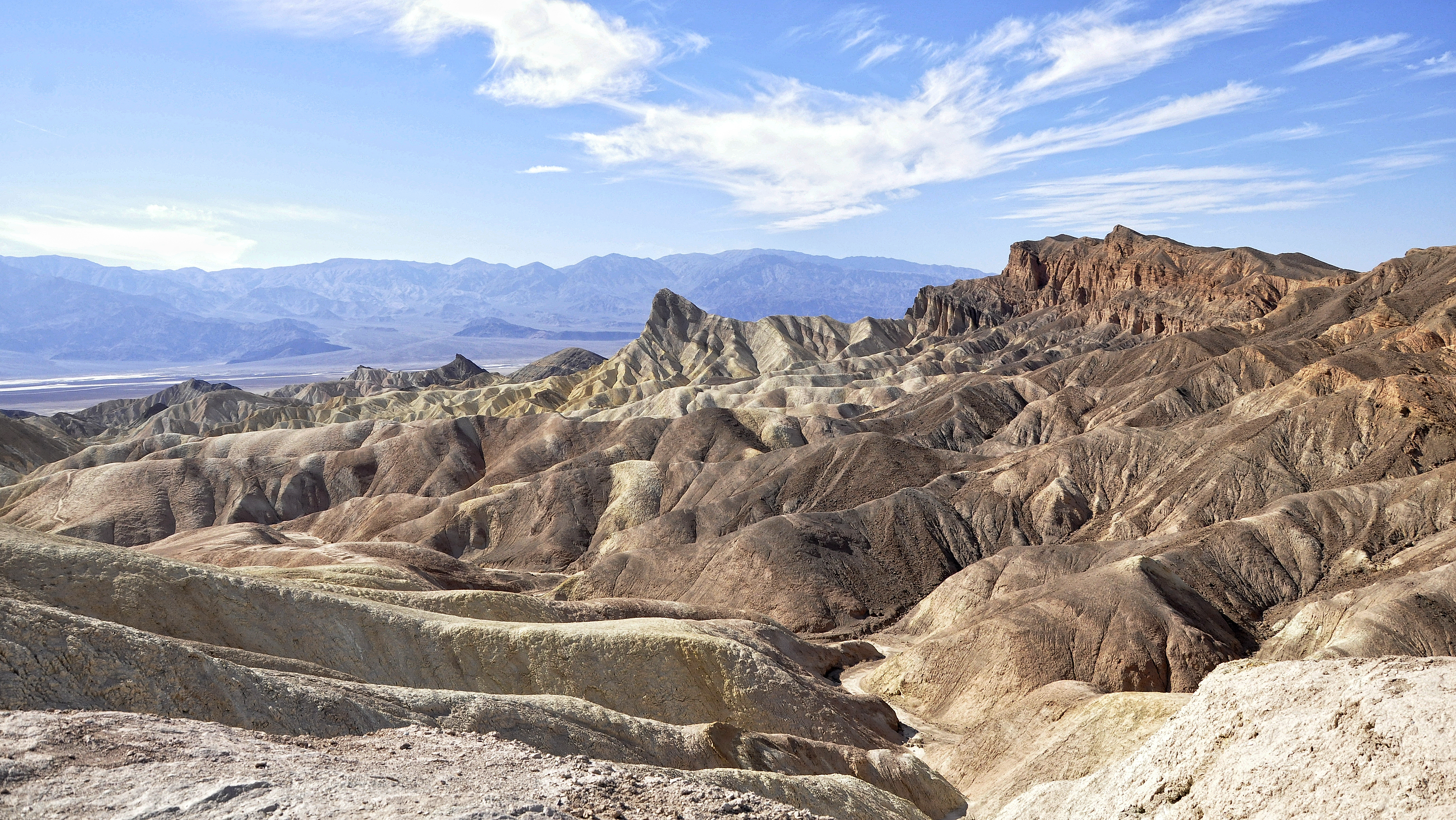 Zabriskie Point met Manly Beacon in Death Valley, USA